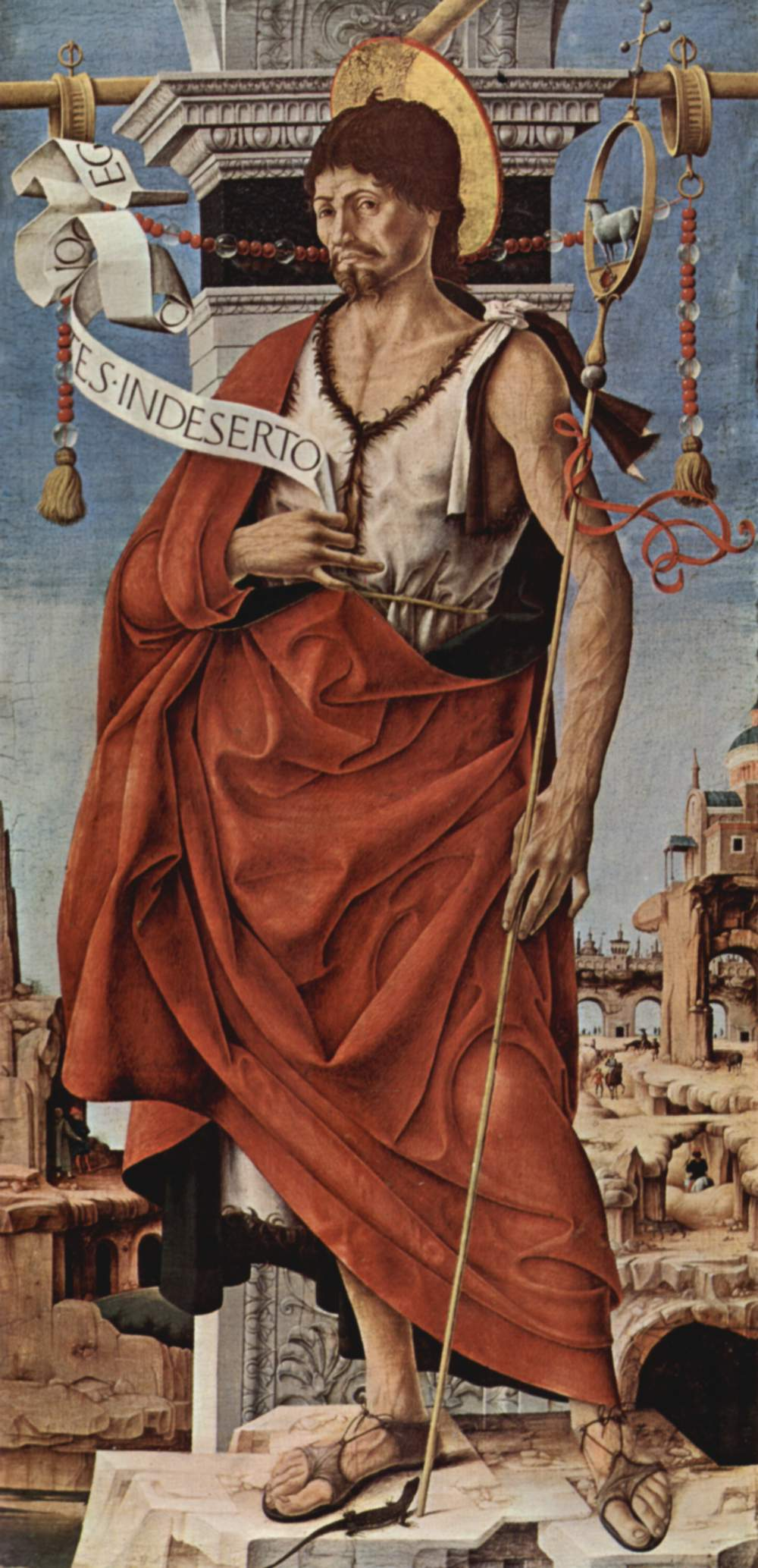 Griffoni-Altar, rechter Flügel